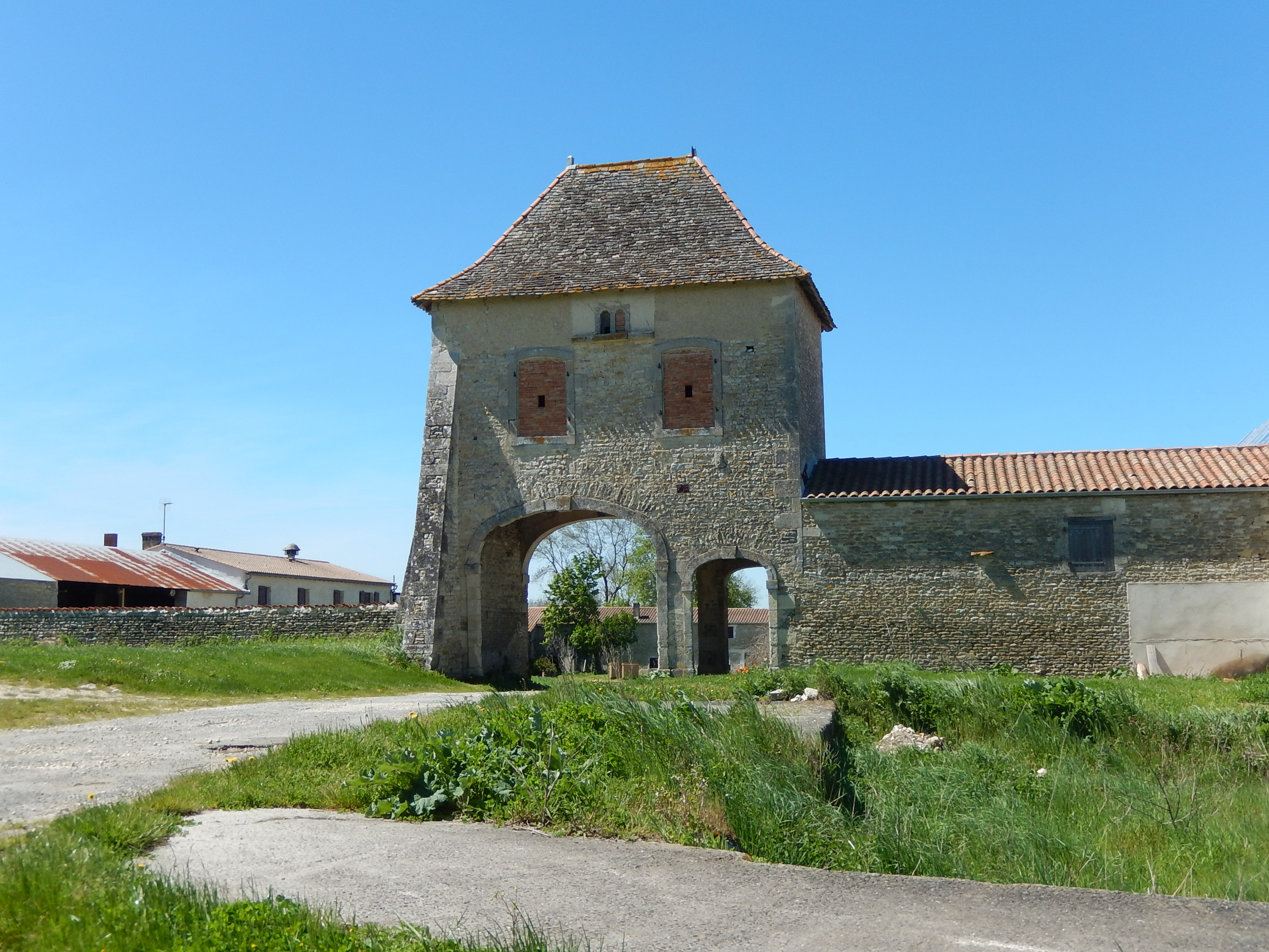 L'entrée du remarquable logis de la Bastière, au sud-ouest de Saint-Laurent-de-la-Barrière.